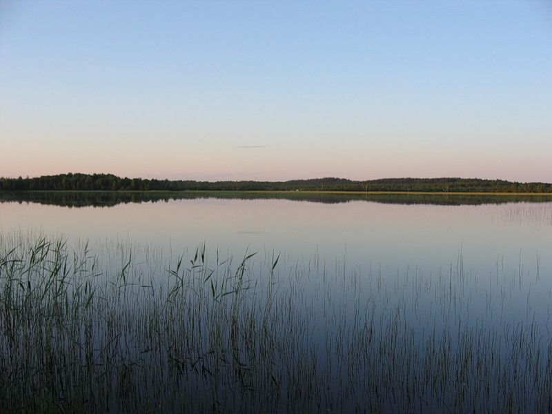 Озеро Суоярви